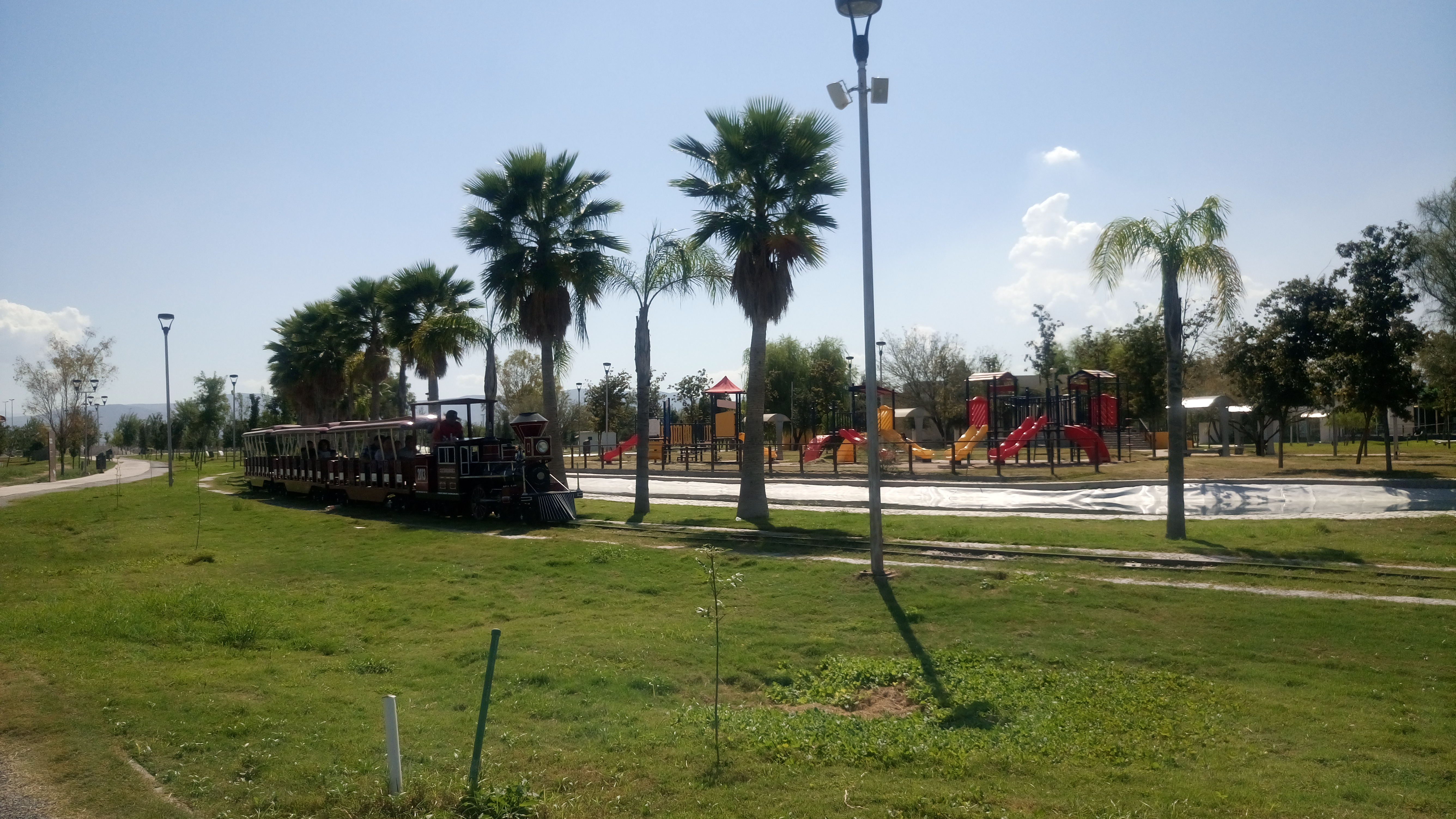 Bosque Urbano Torreon Coahuila